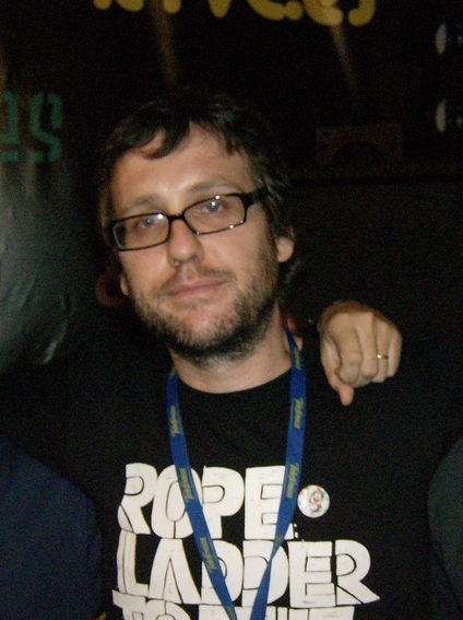 Foto recortada. El actor y cómico Joaquín Reyes en la Campus Party 2008.